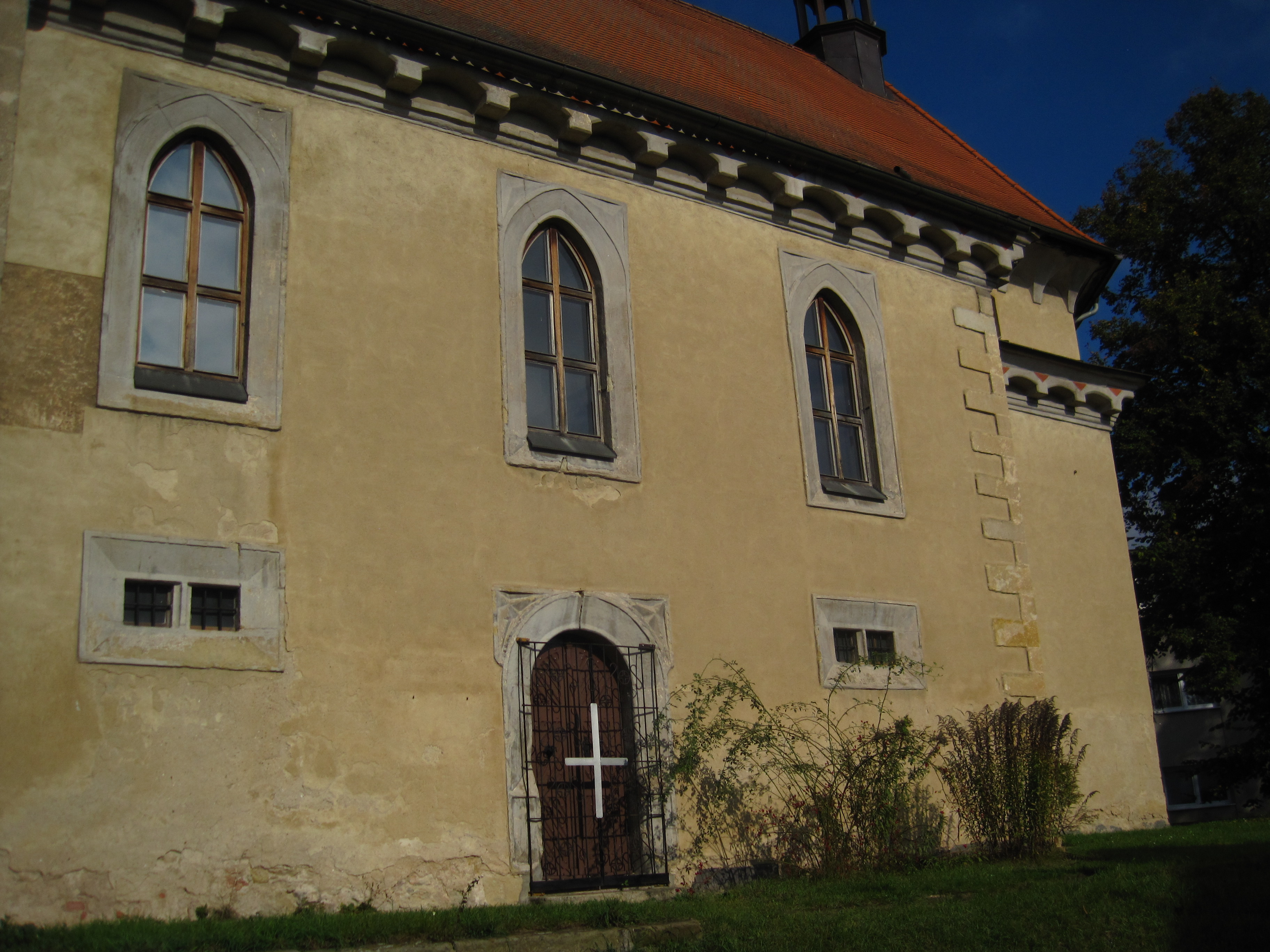 Kostel svatého Bartoloměje, Mírové náměstí, Bakov nad Jizerou.